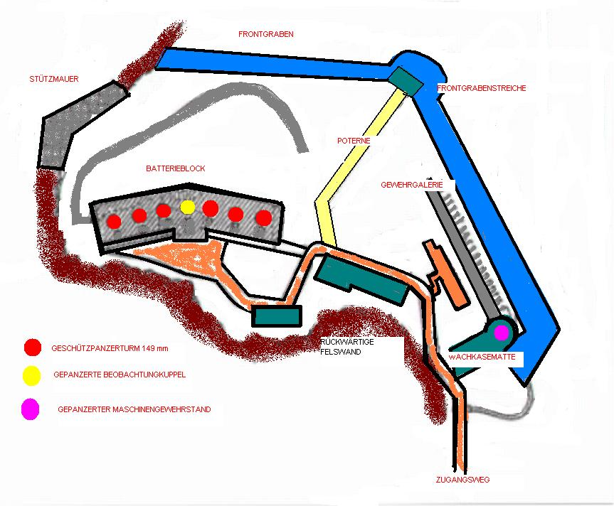 Forte Punta Corbin